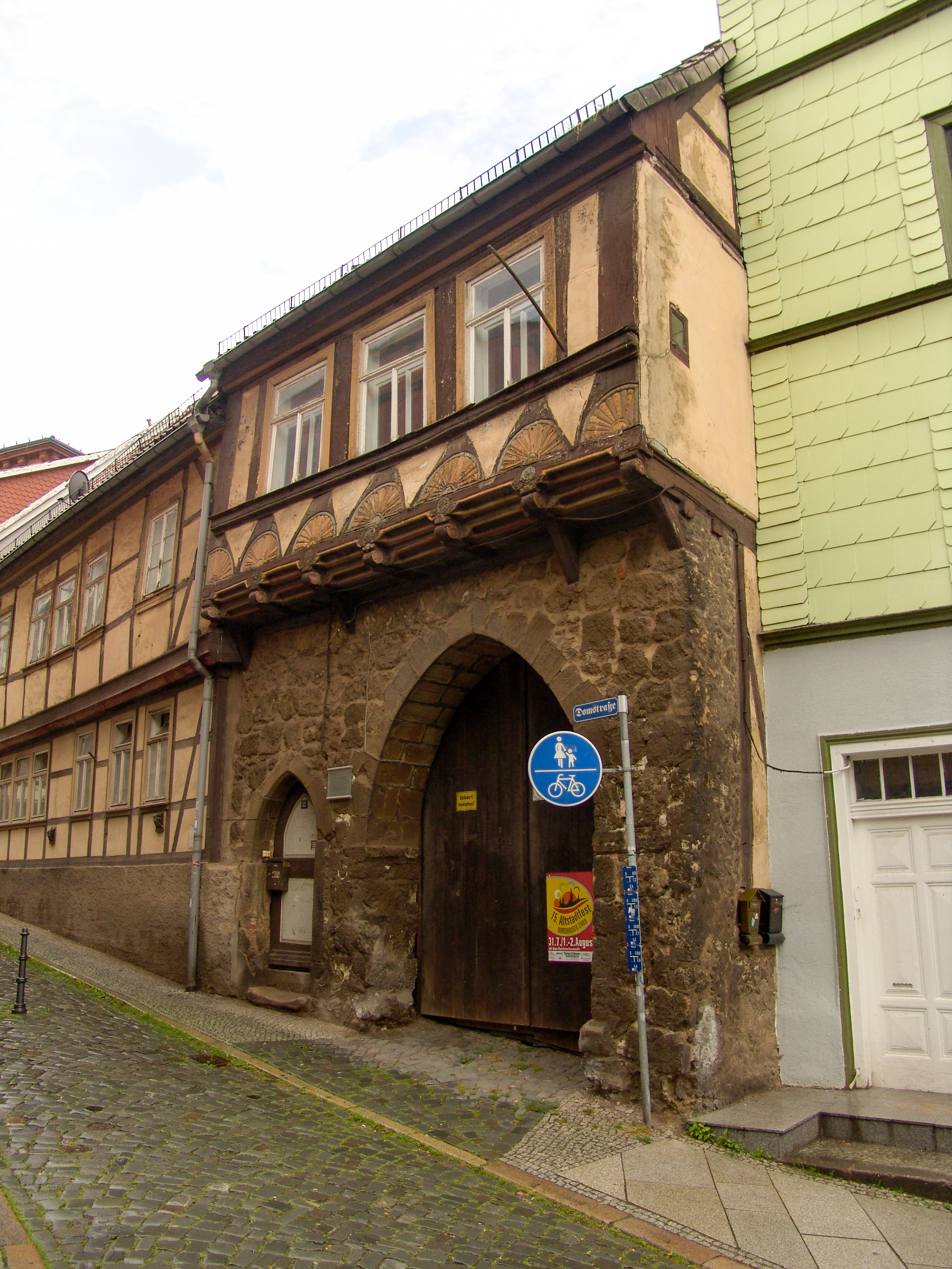 Nordhausen, Domstraße 12